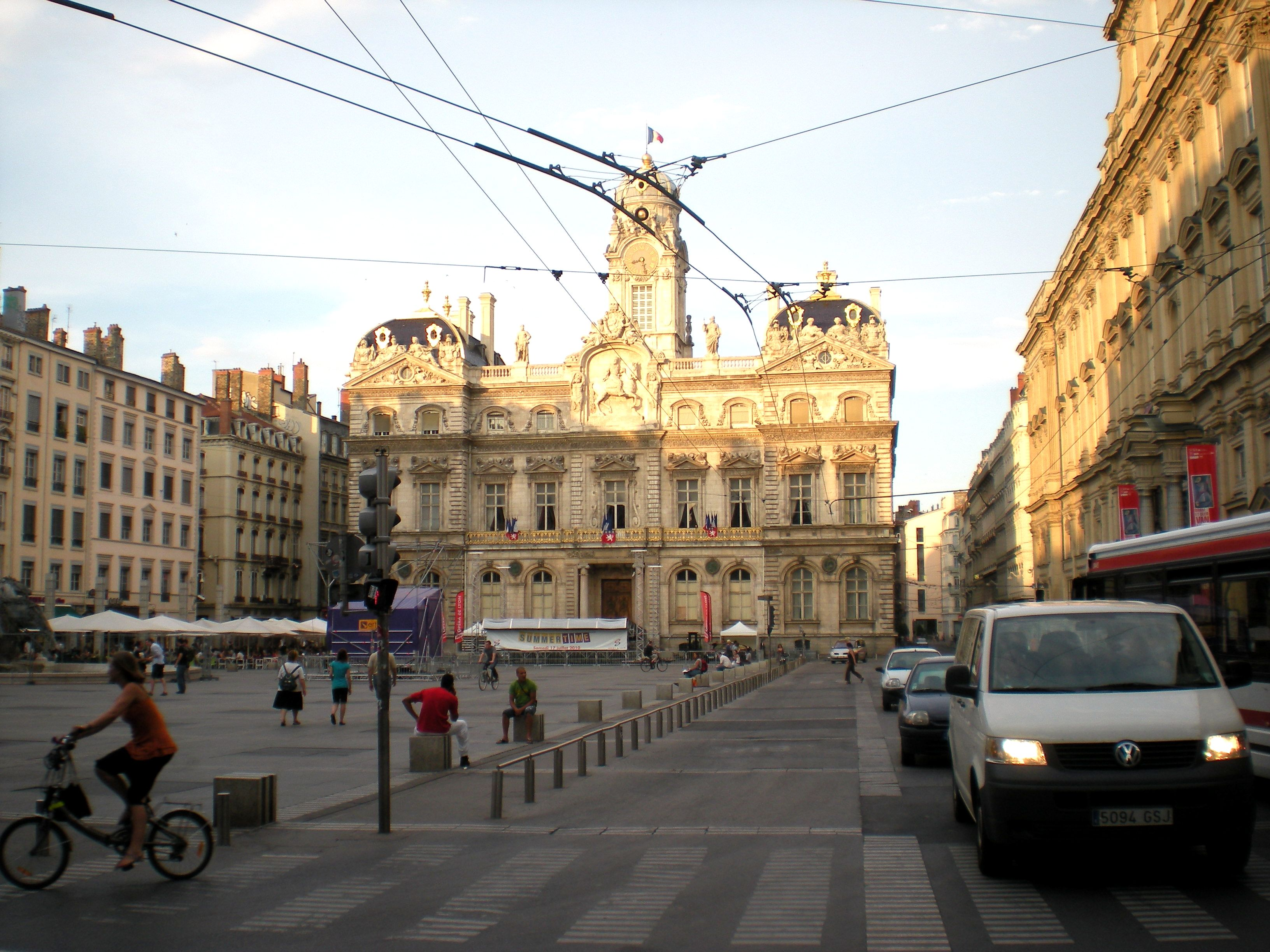 Place des Terreaux, en el centro de Lyon. Es la plaza más monumental de la ciudad y en ella se encuentra el Ayuntamiento.